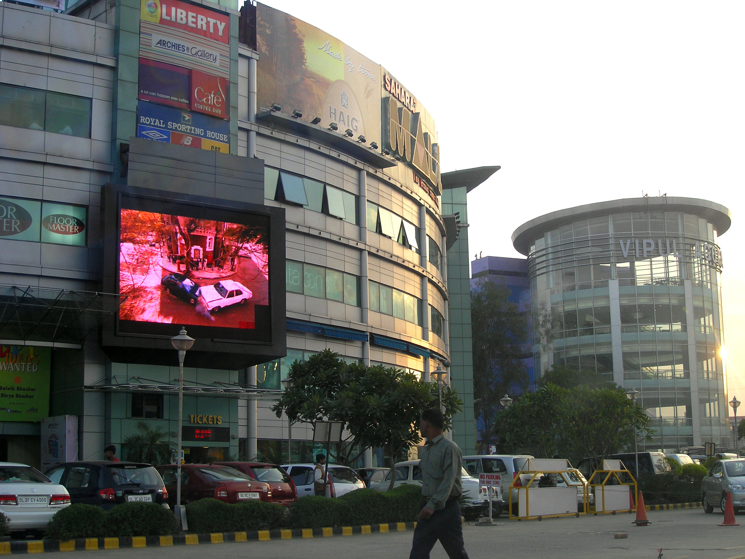 Sahara Mall, Gurgaon, Haryana, India.